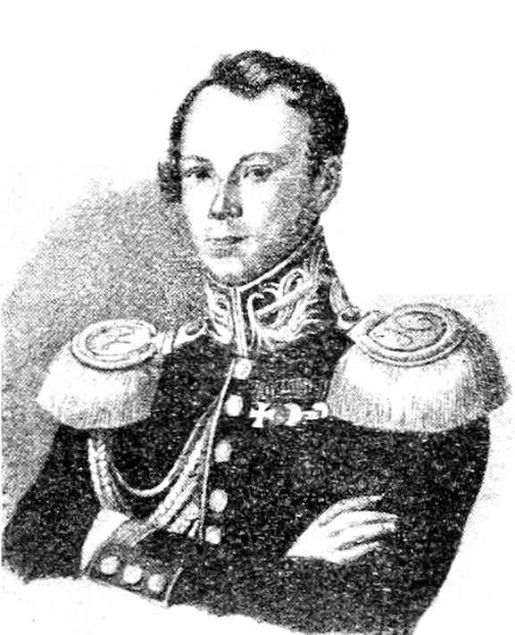 Это изображение было использовано для иллюстрирования статьи «Казарский, Александр Иванович» опубликованной в одиннадцатом томе «Военной энциклопедии», который был издан книгоиздательским товариществом И. Д. Сытина в 1913 году в столице Российской империи городе Санкт-Петербурге.